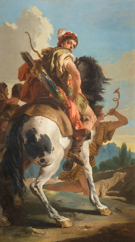 Cacciatore a cavallotitle QS:P1476,it:"Cacciatore a cavallo" label QS:Lit,"Cacciatore a cavallo"